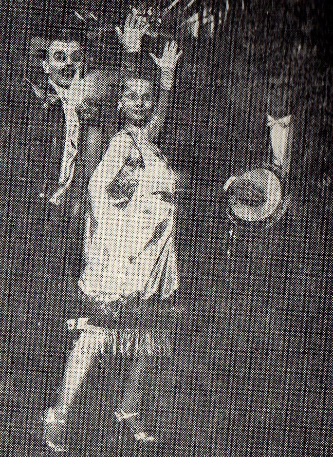 Jerzy Satanowski, Decadance, Poznań, Teatr Nowy. Dorota Lulka i Paweł Binkowski. XII 1987 r.